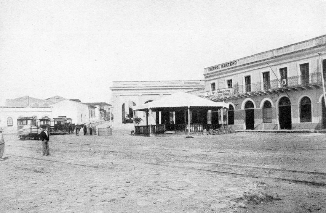 Asunción del Paraguay, 1892. Excursion Científica por los ríos Paraguay, Alto Paraná e Iguazú, en 1892. Shows the terminus of Sr. Horrocks original tram line, in front of the Puerto de Asunción.